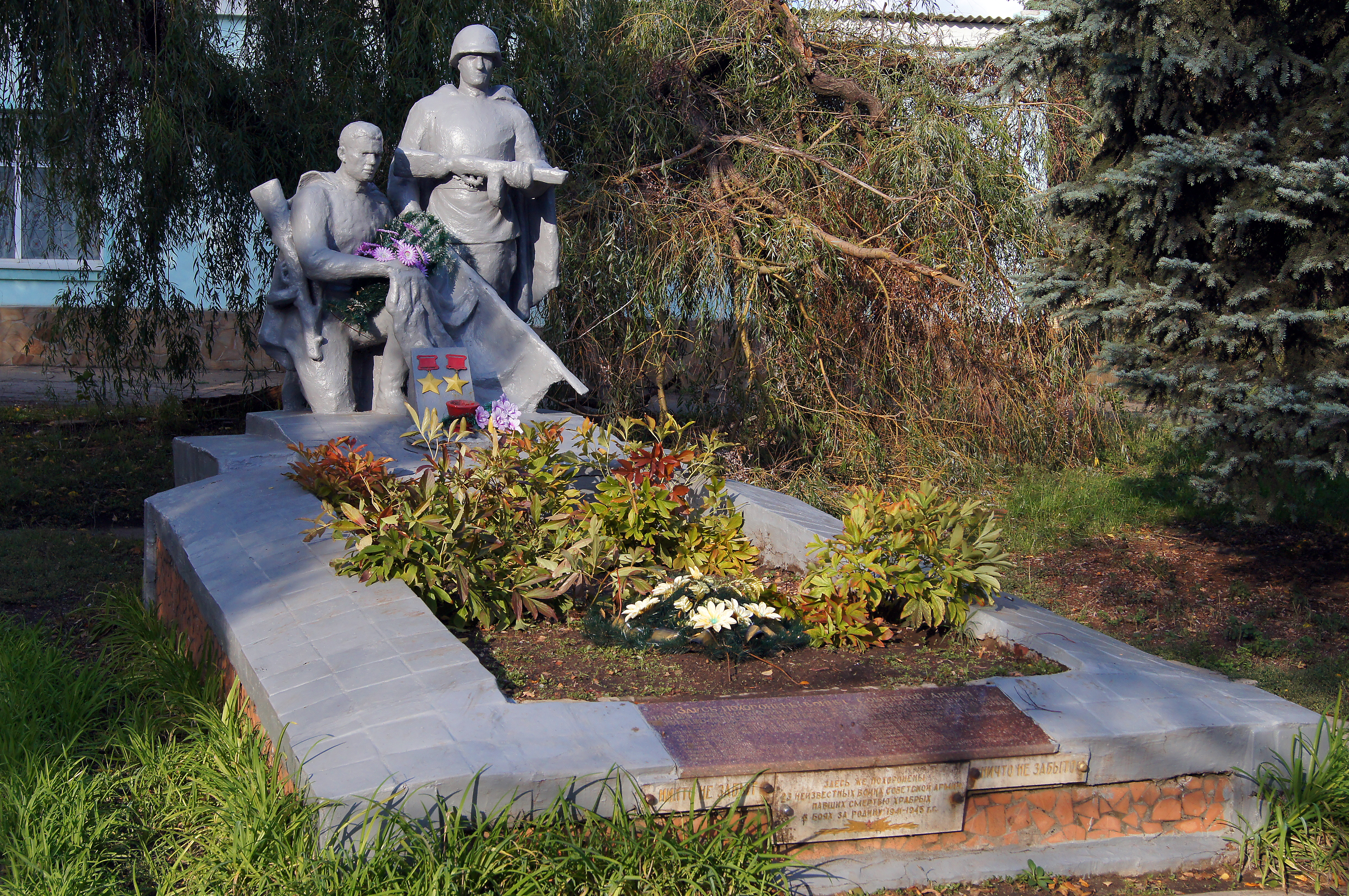 Могила братська радянських воїнів, серед яких поховані Герої Радянського Союзу С.А. Желєзний, Н.Т. Гнилицька, с. Вахрушеве, вул. ім. Луначарського (кол. шахта 7-8)